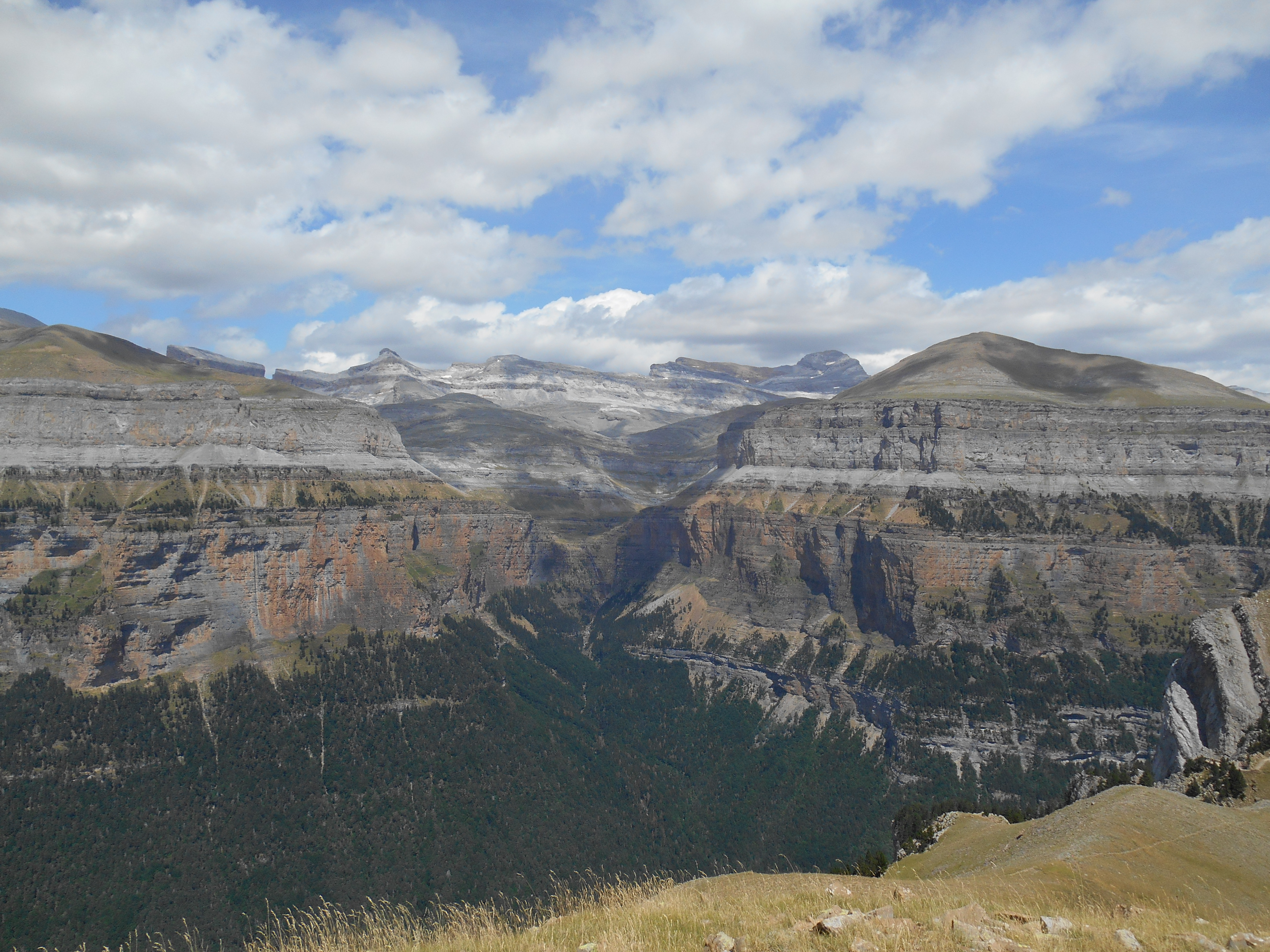 Aragonés: Punta Tobacor dende punta Acuta